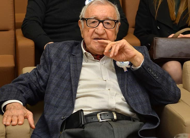 Prof.Dr. Oktay Güvemli